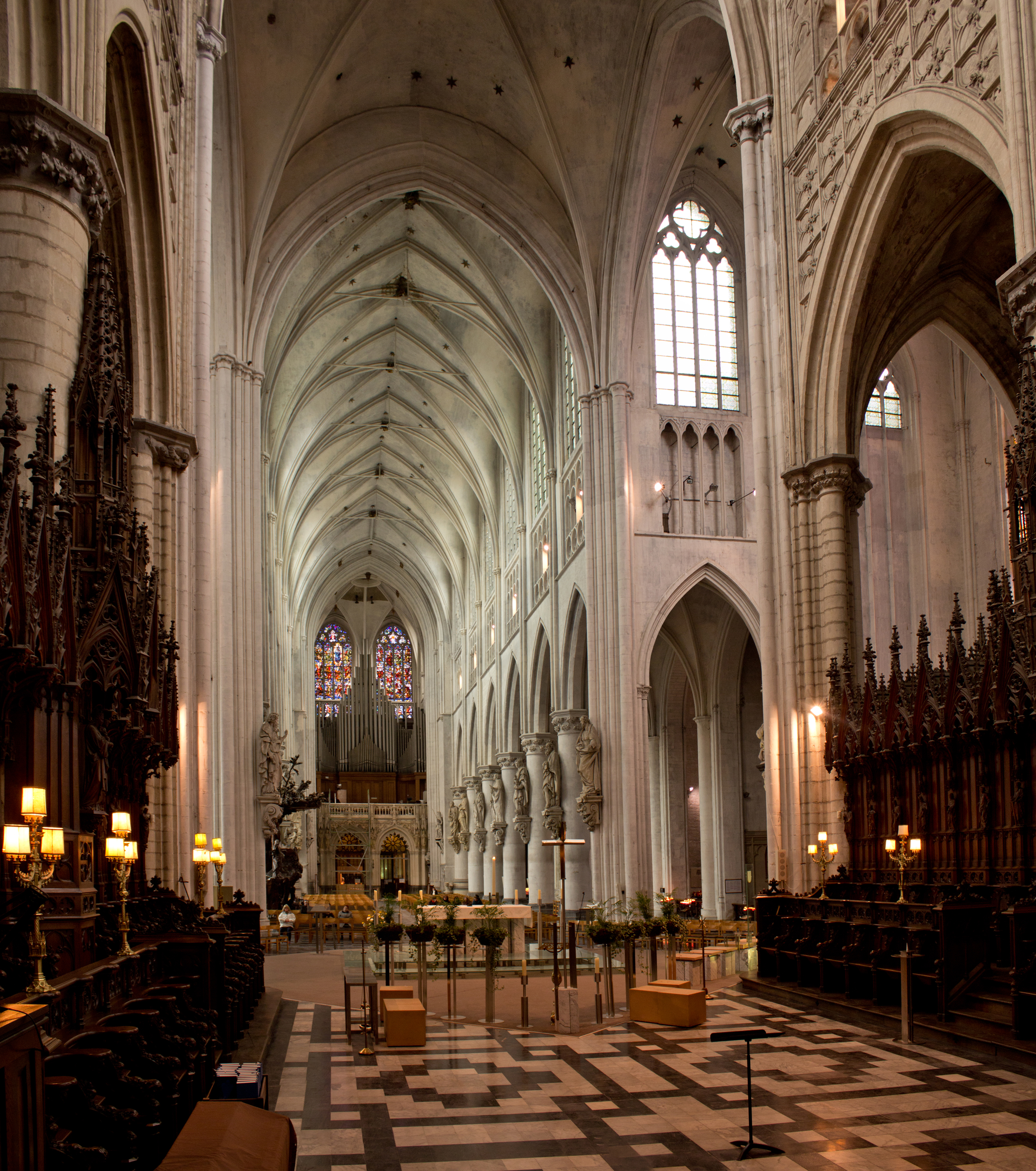 Sint Romboutskathedraal, Mechelen.